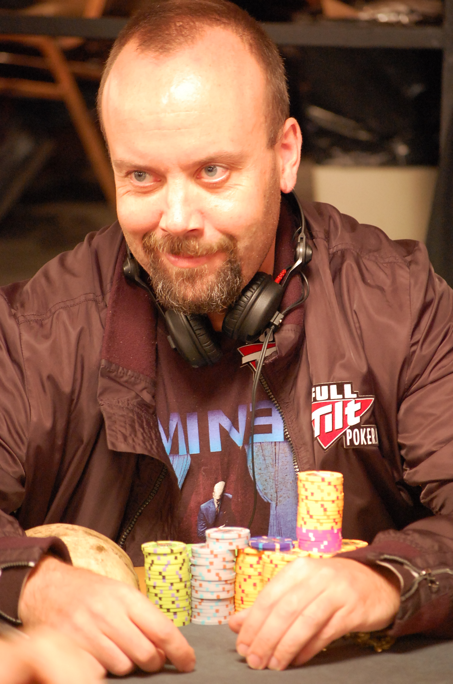 Andy Black bei der World Series of Poker 2008